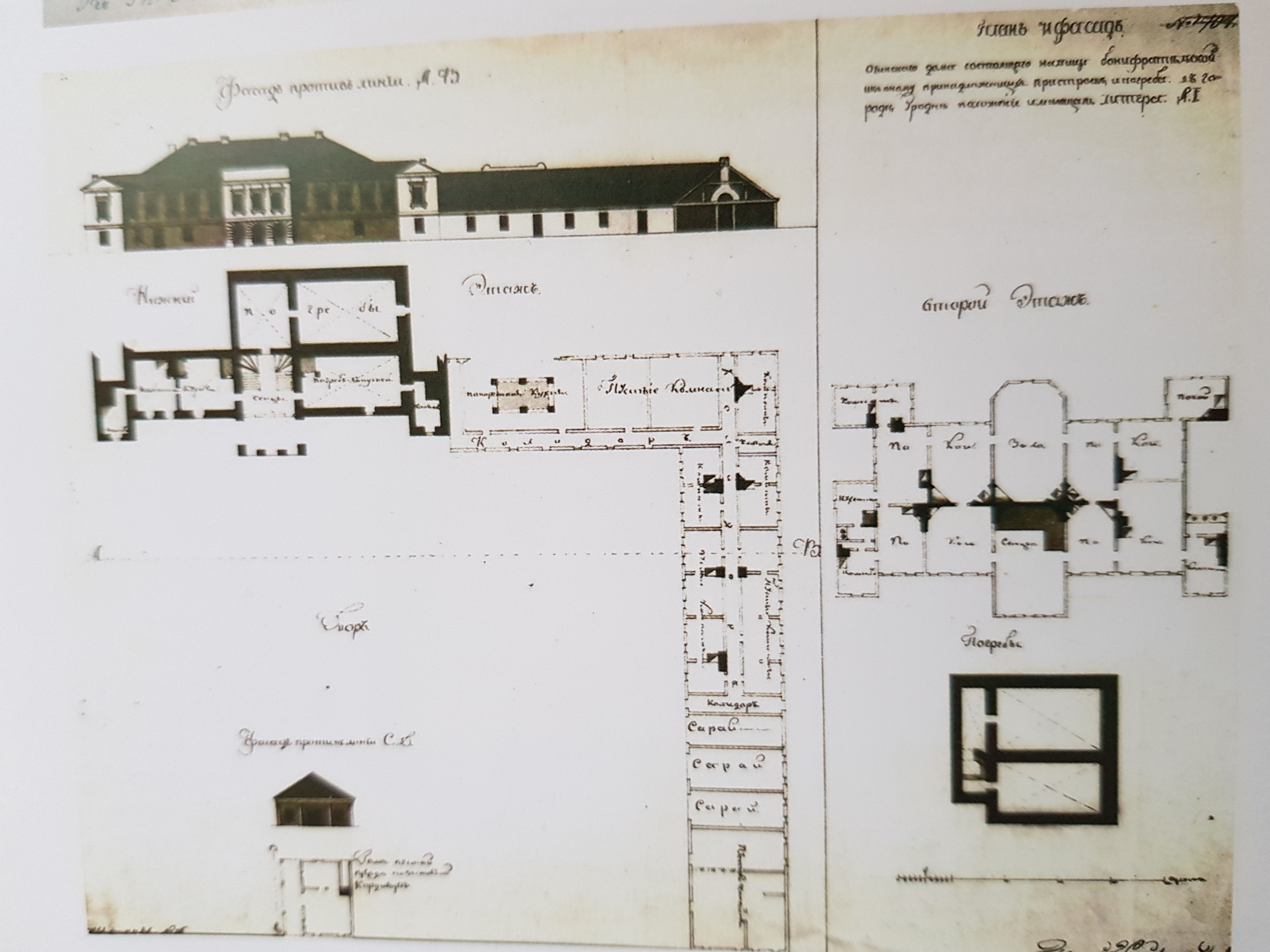 Фасады і планы паверхаў будынкаў палацавага комплекса Агінскага ў Гродне. Чарцёж губернскага архітэктара В. Багеміля, паміж 1811 і 1826. РДГА, ф. 1488, воп. 168, воп. 1, спр. 949